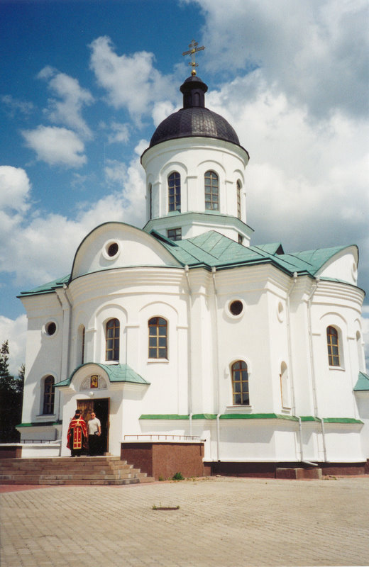 Церковь, построенная Президентом Украины Кучмой Л.Д., взамен сгоревшей деревянной